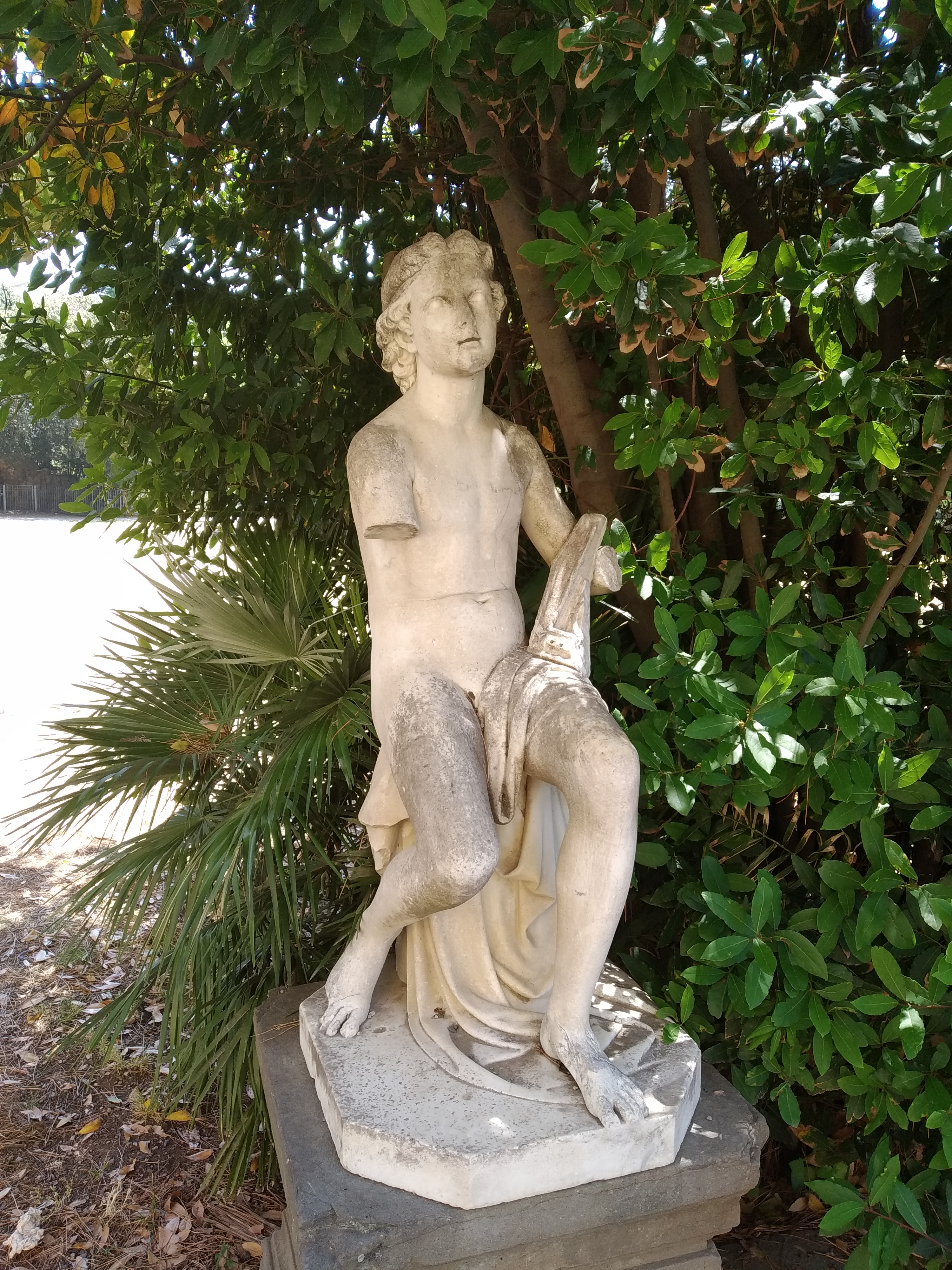 La statua Genietto della Musica di Giovanni Paganucci